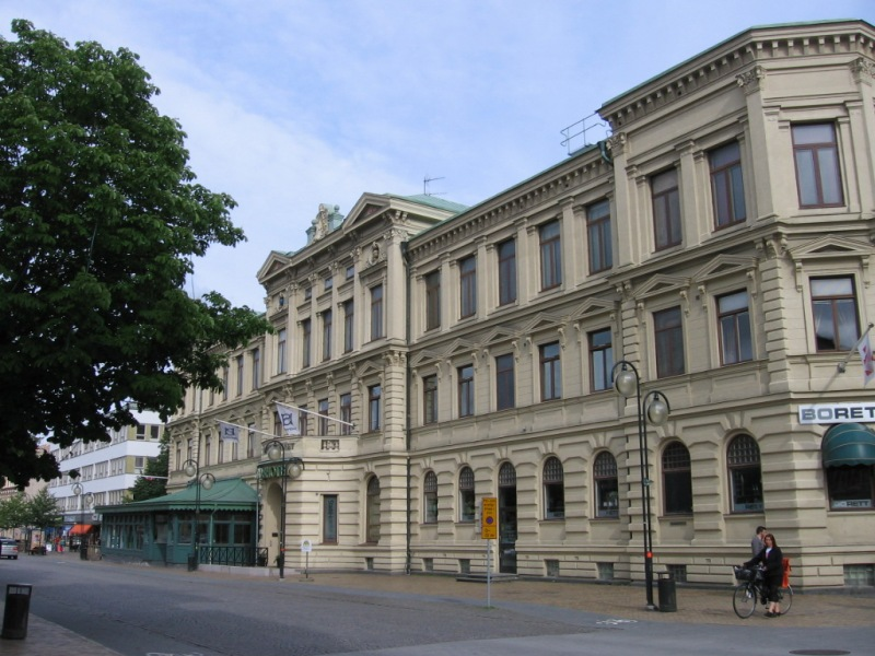 Kristianstad Stadshotell